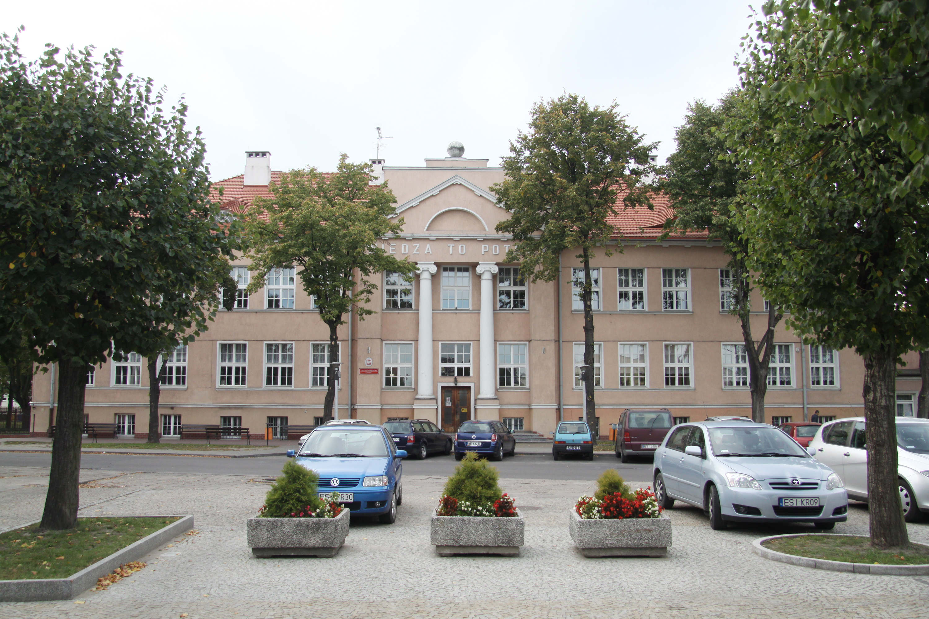 Sieradz- budynek liceum 02.1988.